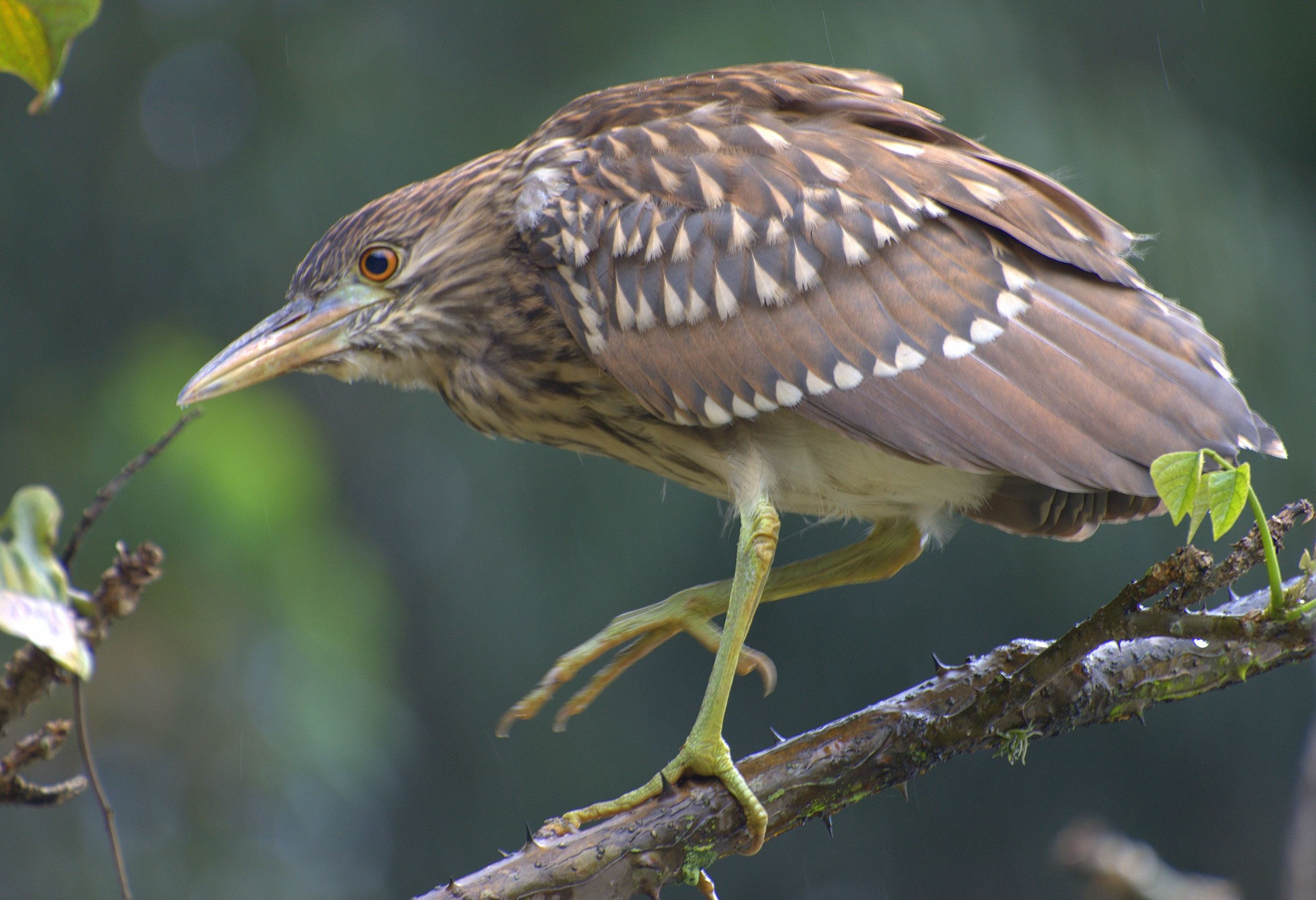 Horto Florestal de São Paulo